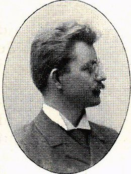 Jakob Petrén (1872-1950), svensk ingenjör